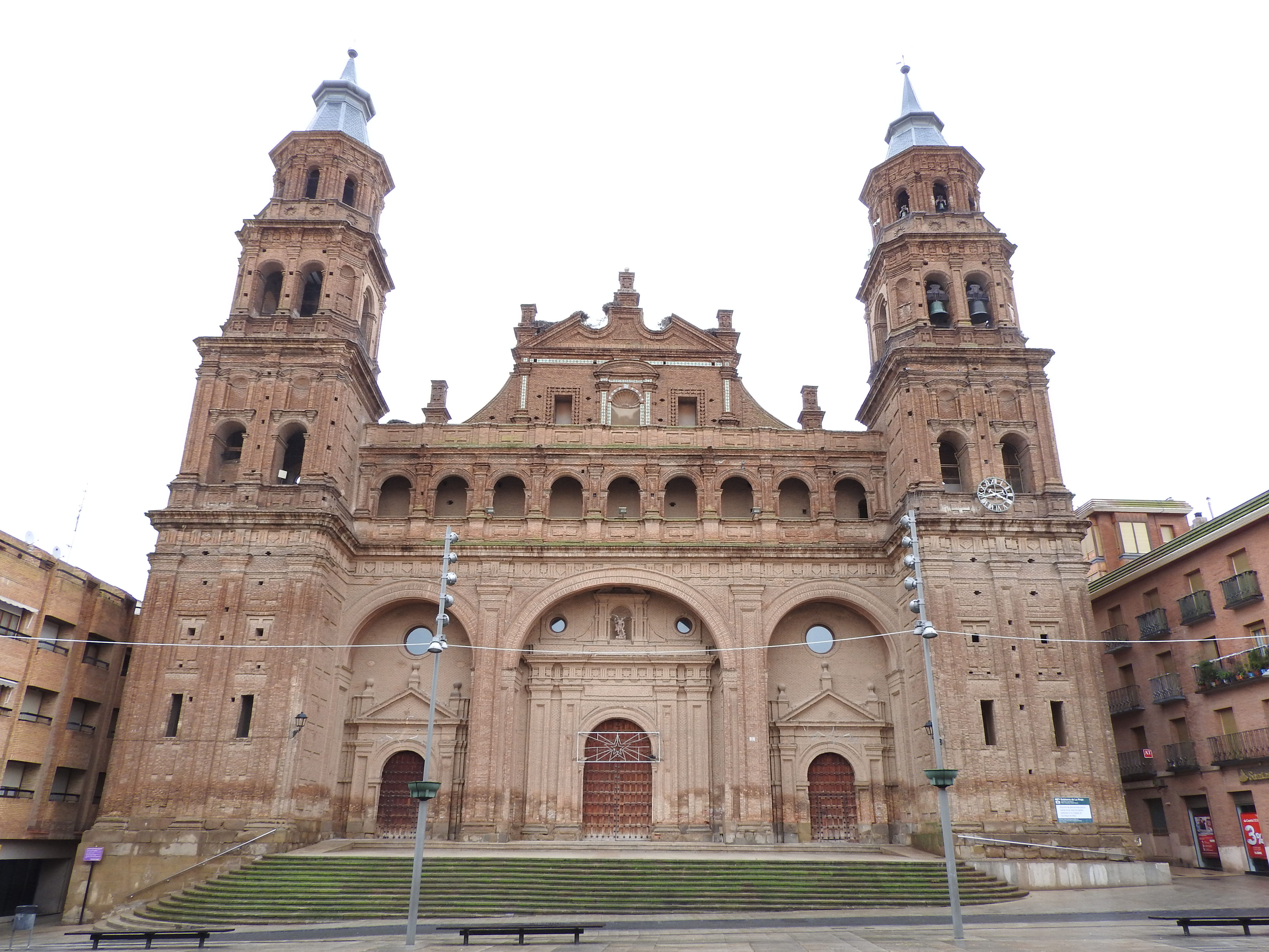 Fachada de la Colegiata de San Miguel Arcángel (Alfaro, La Rioja)